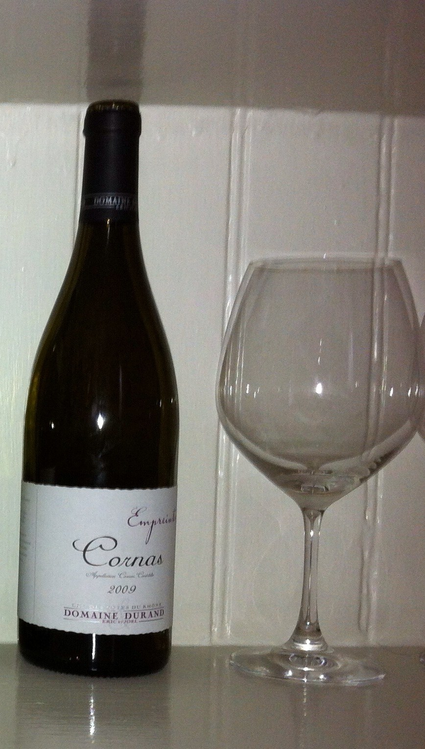 AOC Cornas Rhone valley